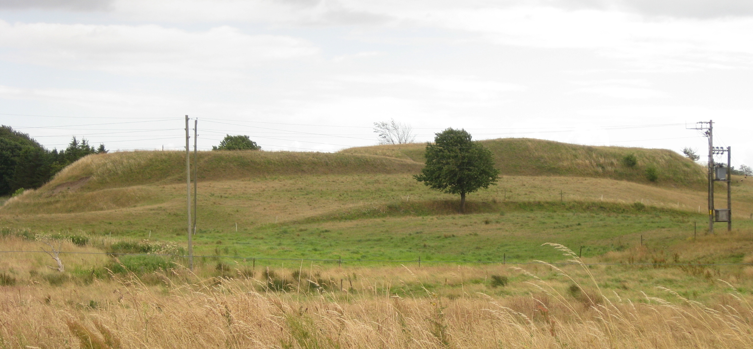 Vallen, Medeltida borglämning i Tomelilla kommun.